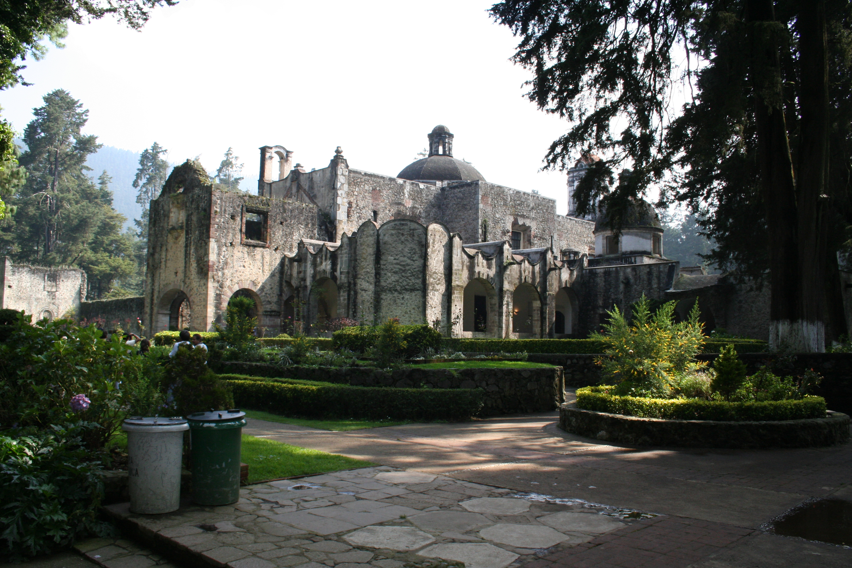 Vista del antiguo convento del Desierto de los Leones. Ciudad de México, México